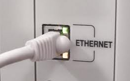 город Ровно